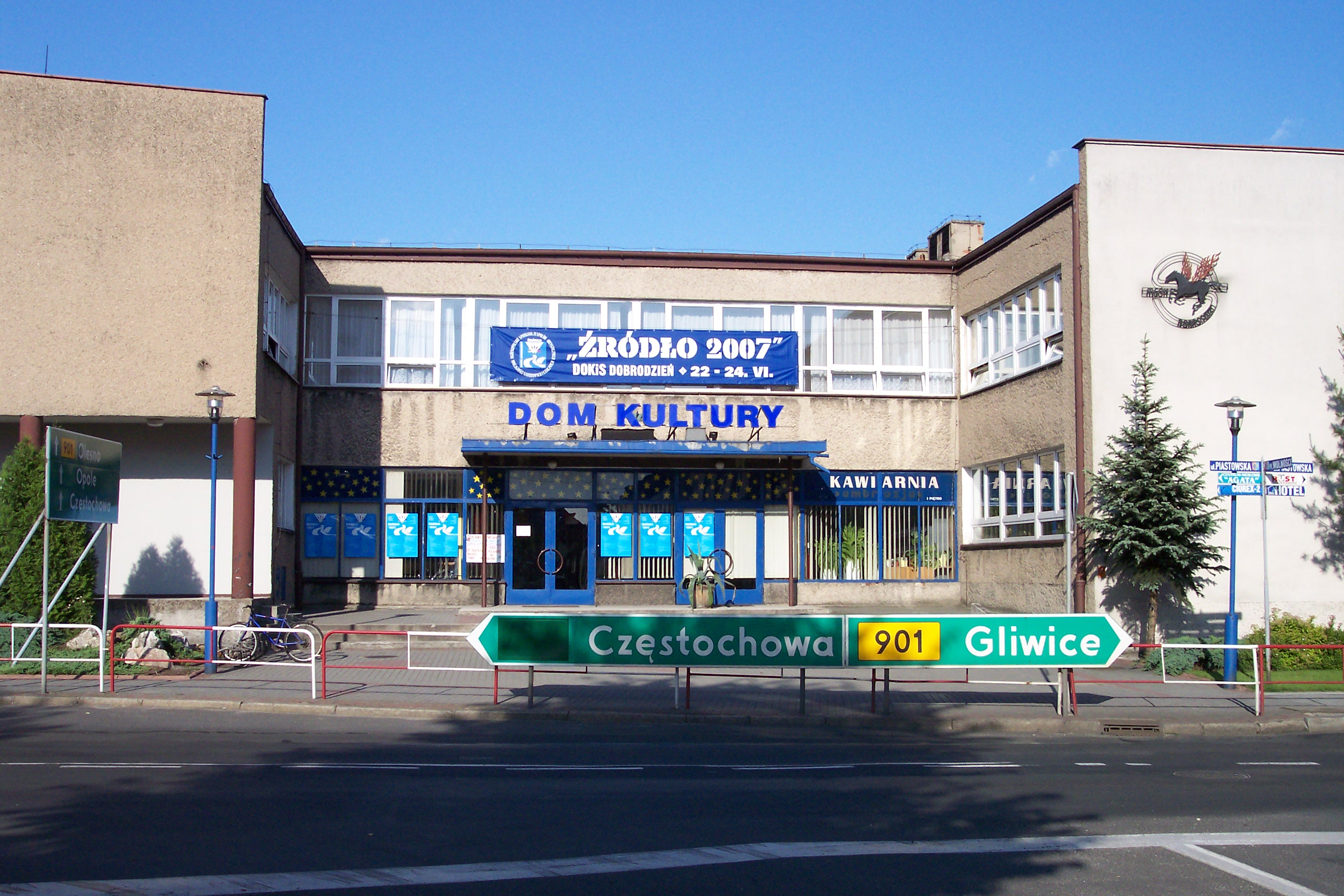 Dom kultury w Dobrodzieniu